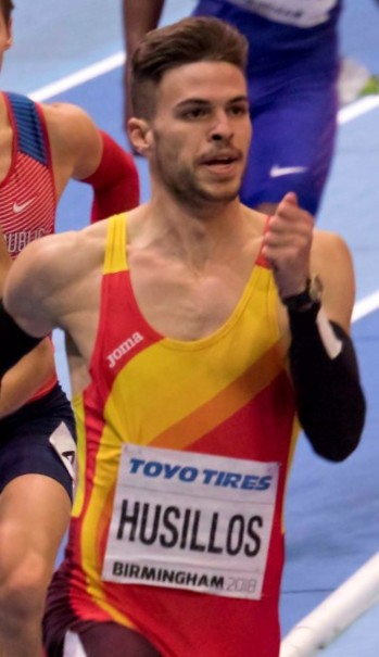 WK3B0262 400m finale heren maslak